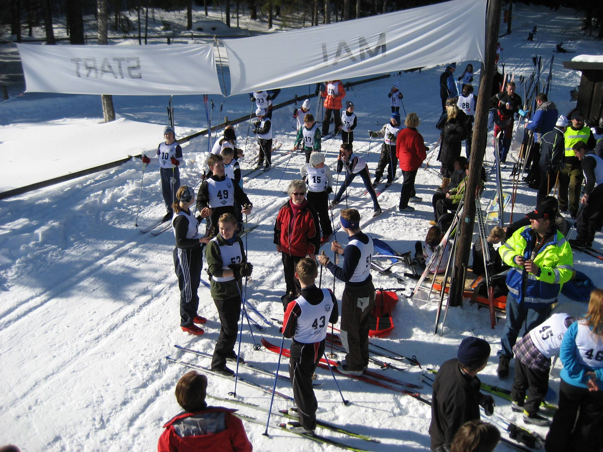 Bildet er fra Farrisbygda Idrettsforenings Ski- og Aktivitetsanlegg på Heum i Farrisbygda